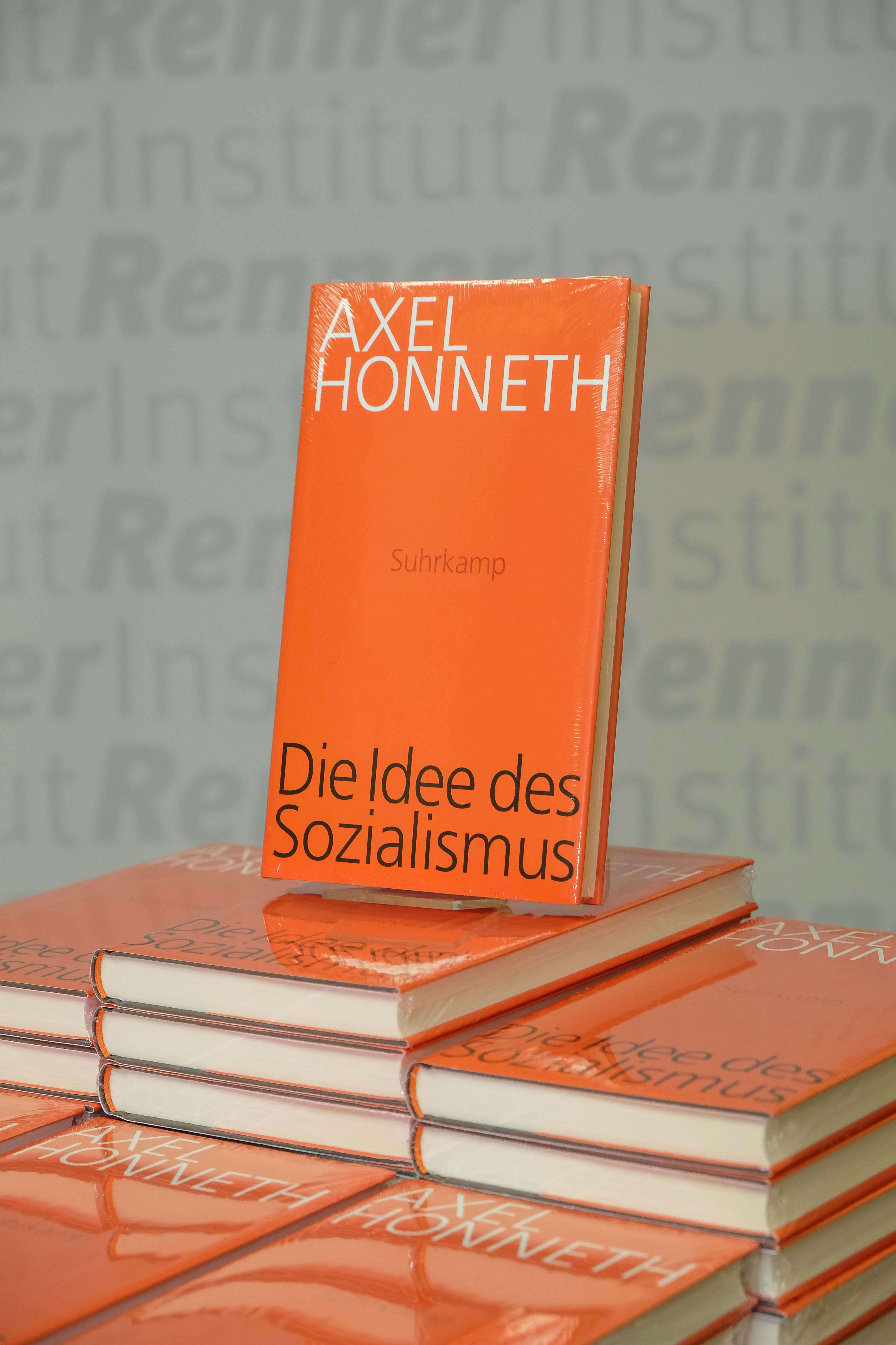 Foto: Walter Henisch Verleihung des Bruno-Kreisky-Preis für das Politische Buch 2015